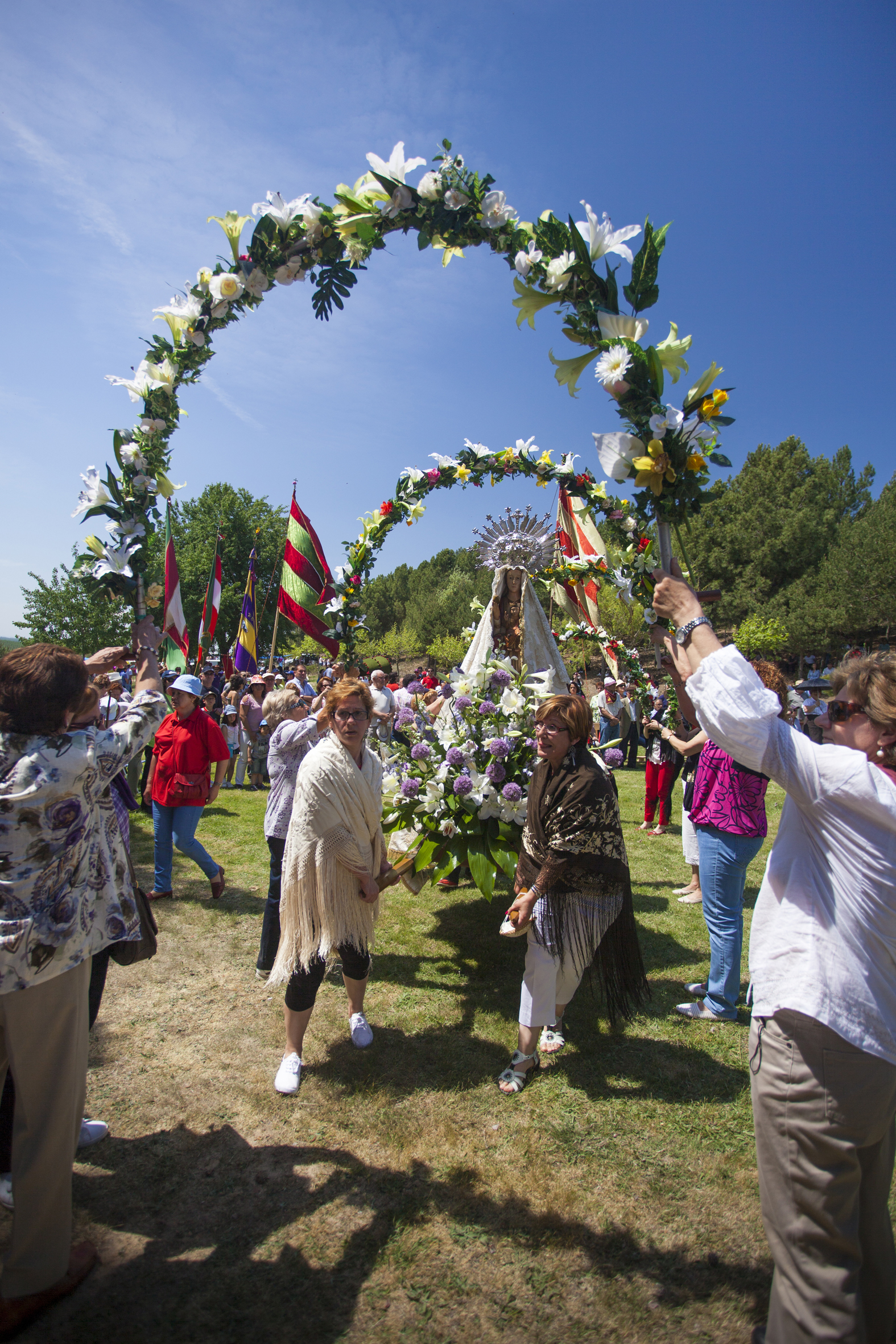 Romería de Nuestra Señora de la Virgen del Villar en Carrizo de la Ribera, León, España. Martes de Pentecostés. 2012 This is a photography of a Folklore festival in Spain (Wikidata id Q26756828).